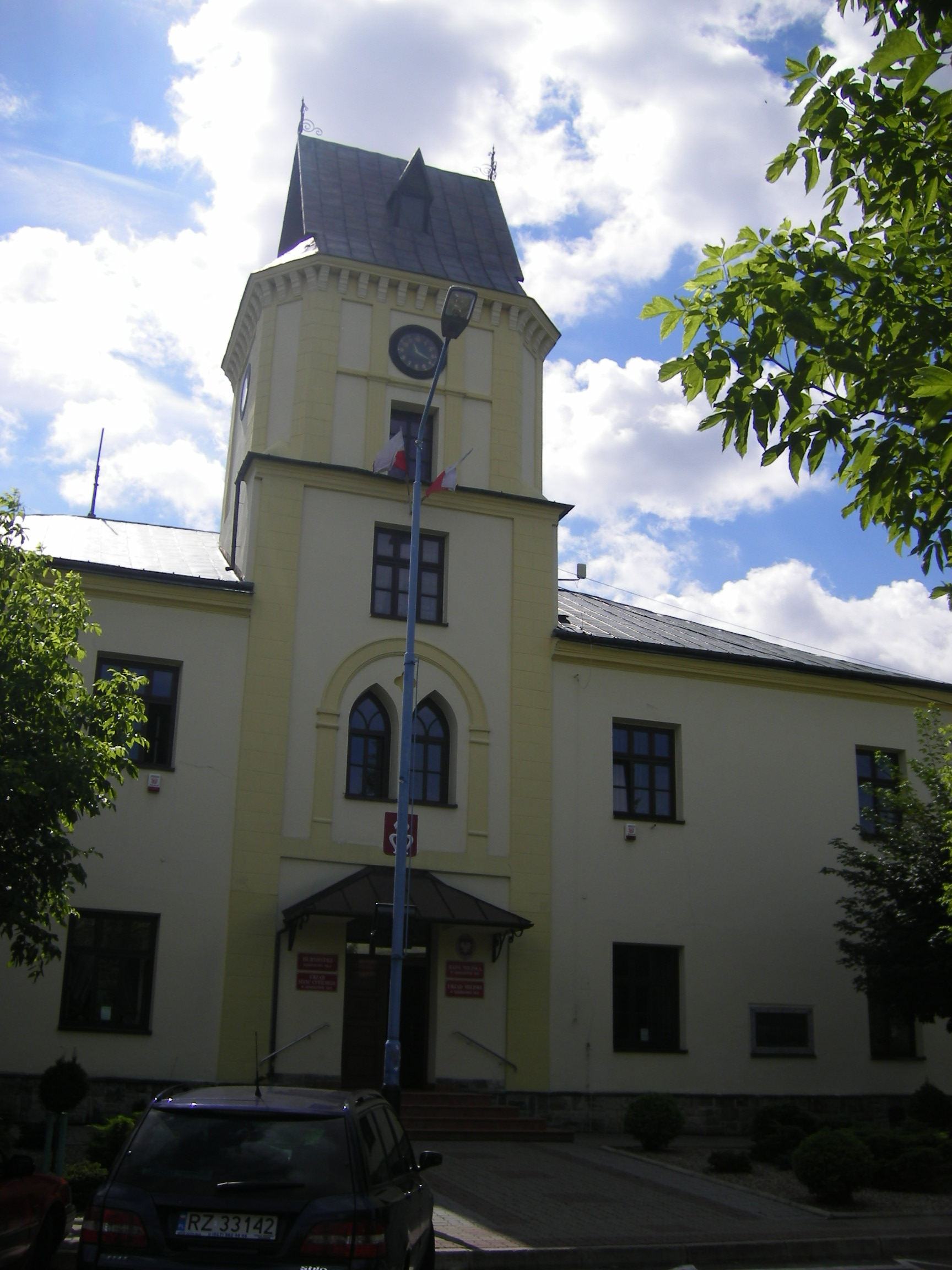 Sędziszów Małopolski, City hall (ratusz)